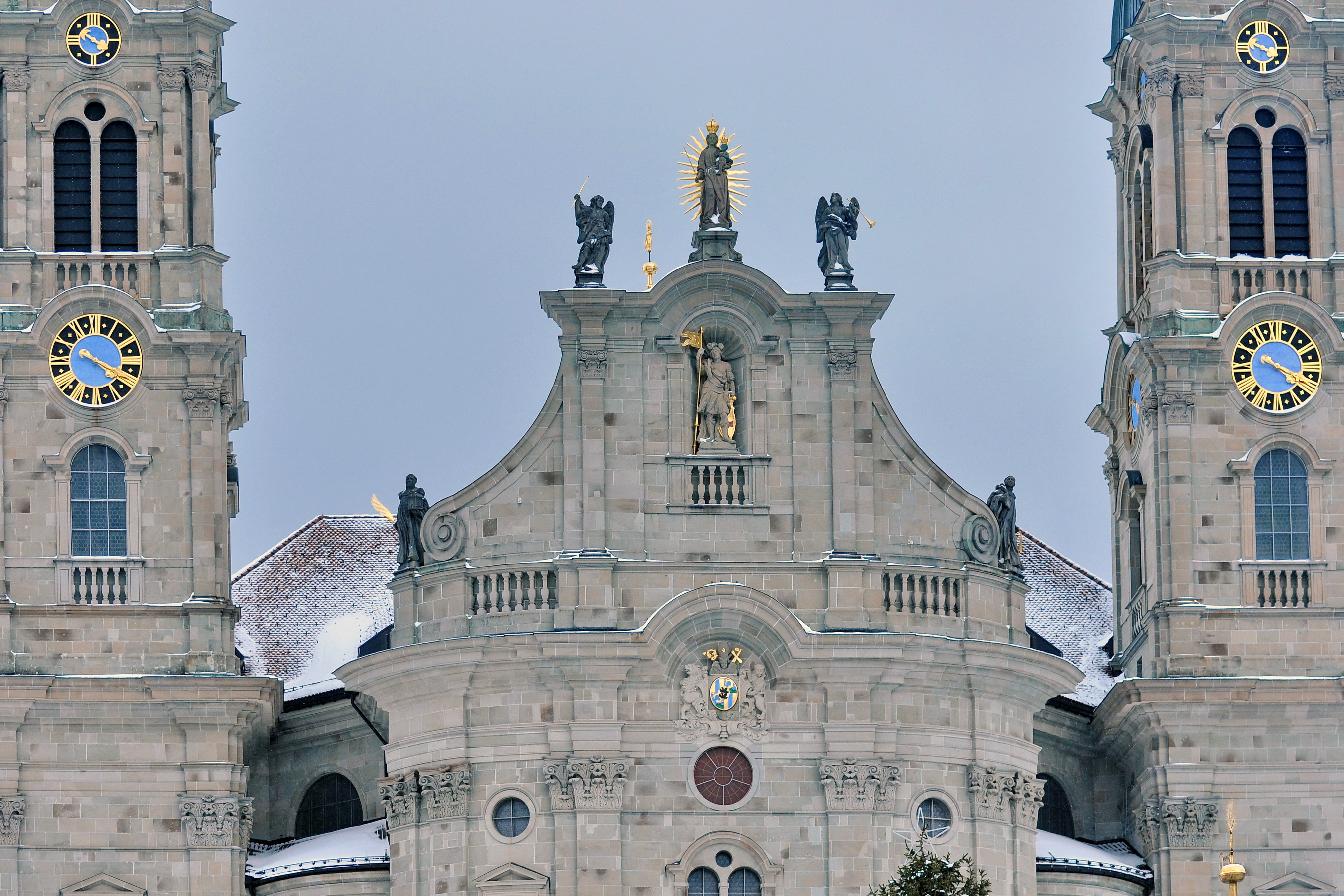 Benedictine Abbey in Einsiedeln (Switzerland)